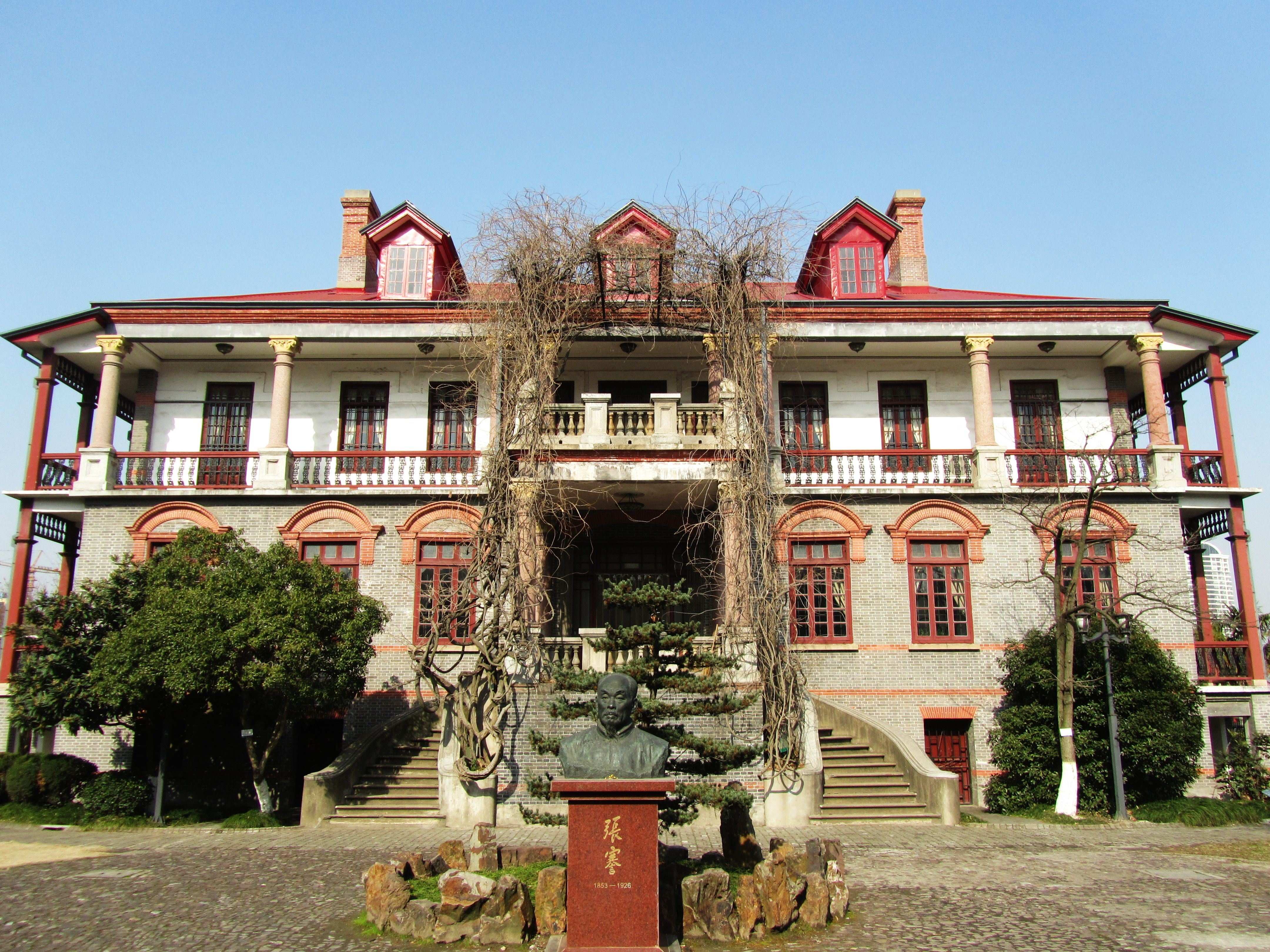 张謇濠南别业东楼，外景。